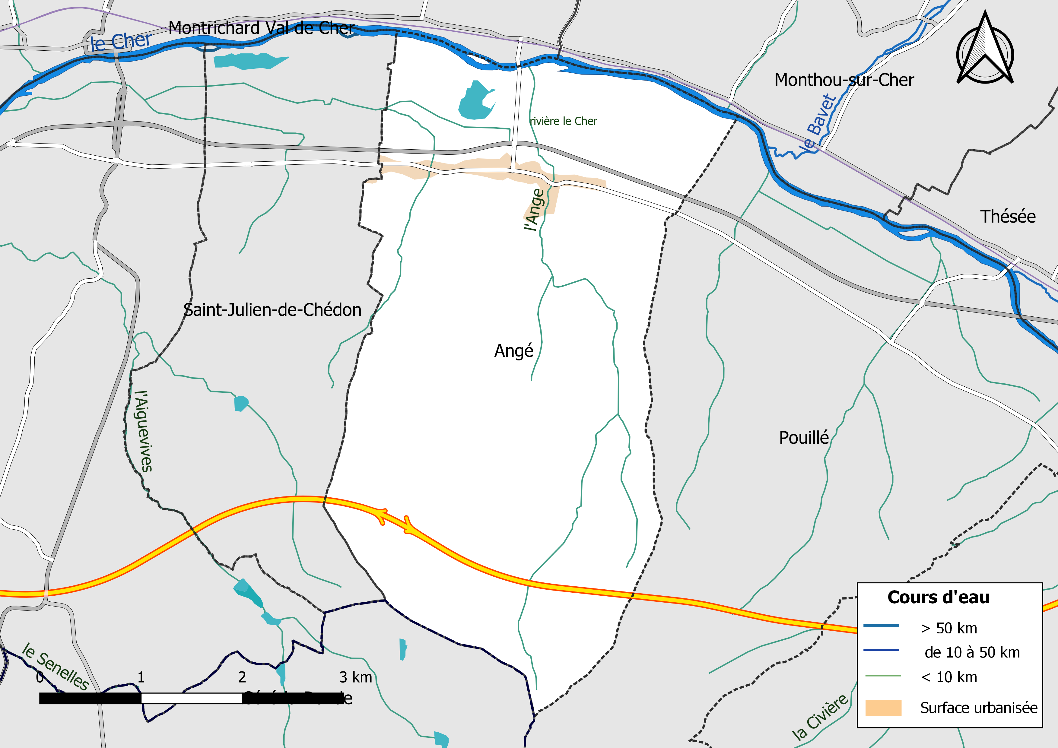 Carte du réseau hydrographique de la commune d'Angé (France).